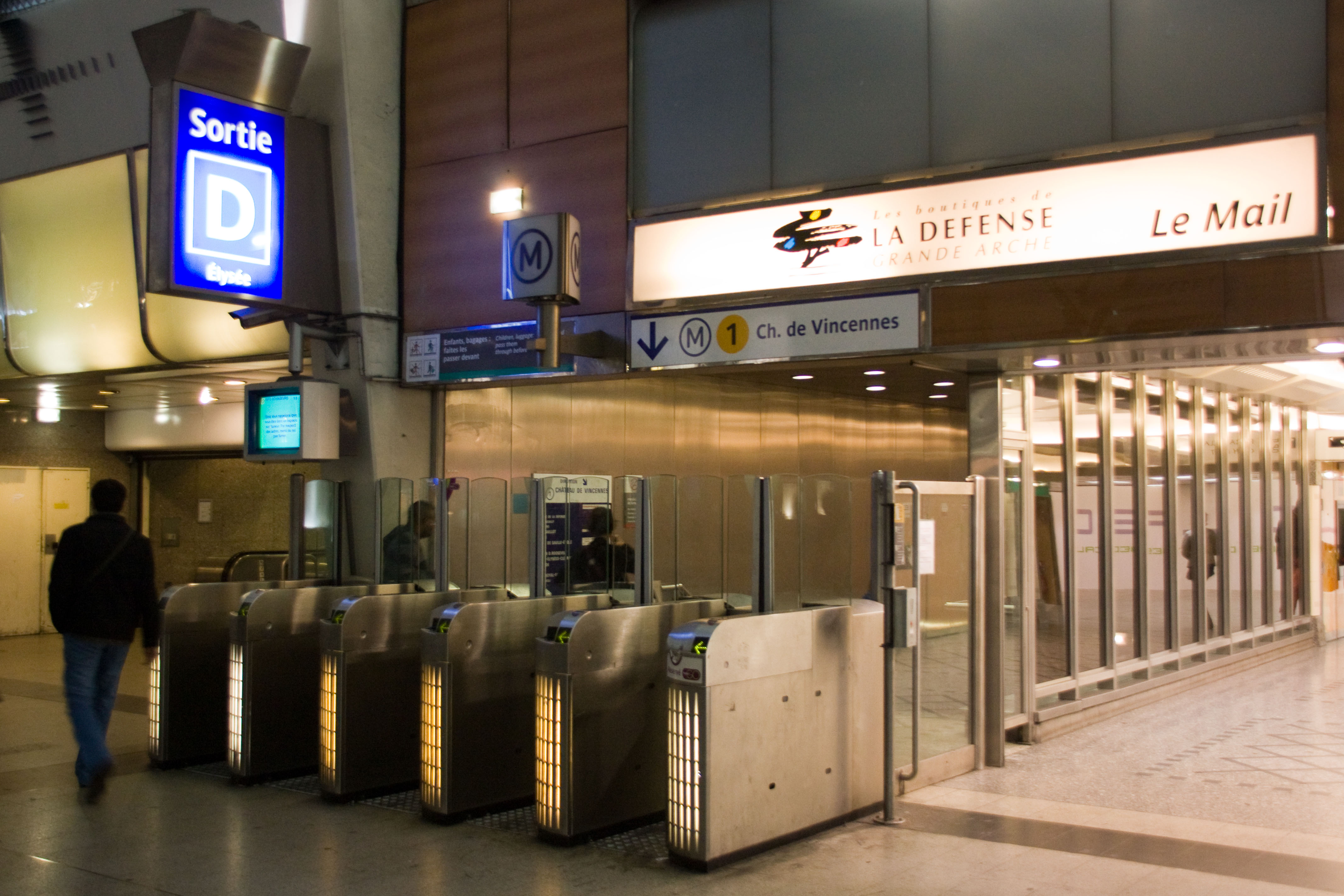 Station Grande-Arche de La Défense, Ligne 1 métro de Paris. (Entrée de la Station, niveau Salle d'Echange, entrée est)